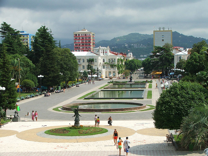 centre